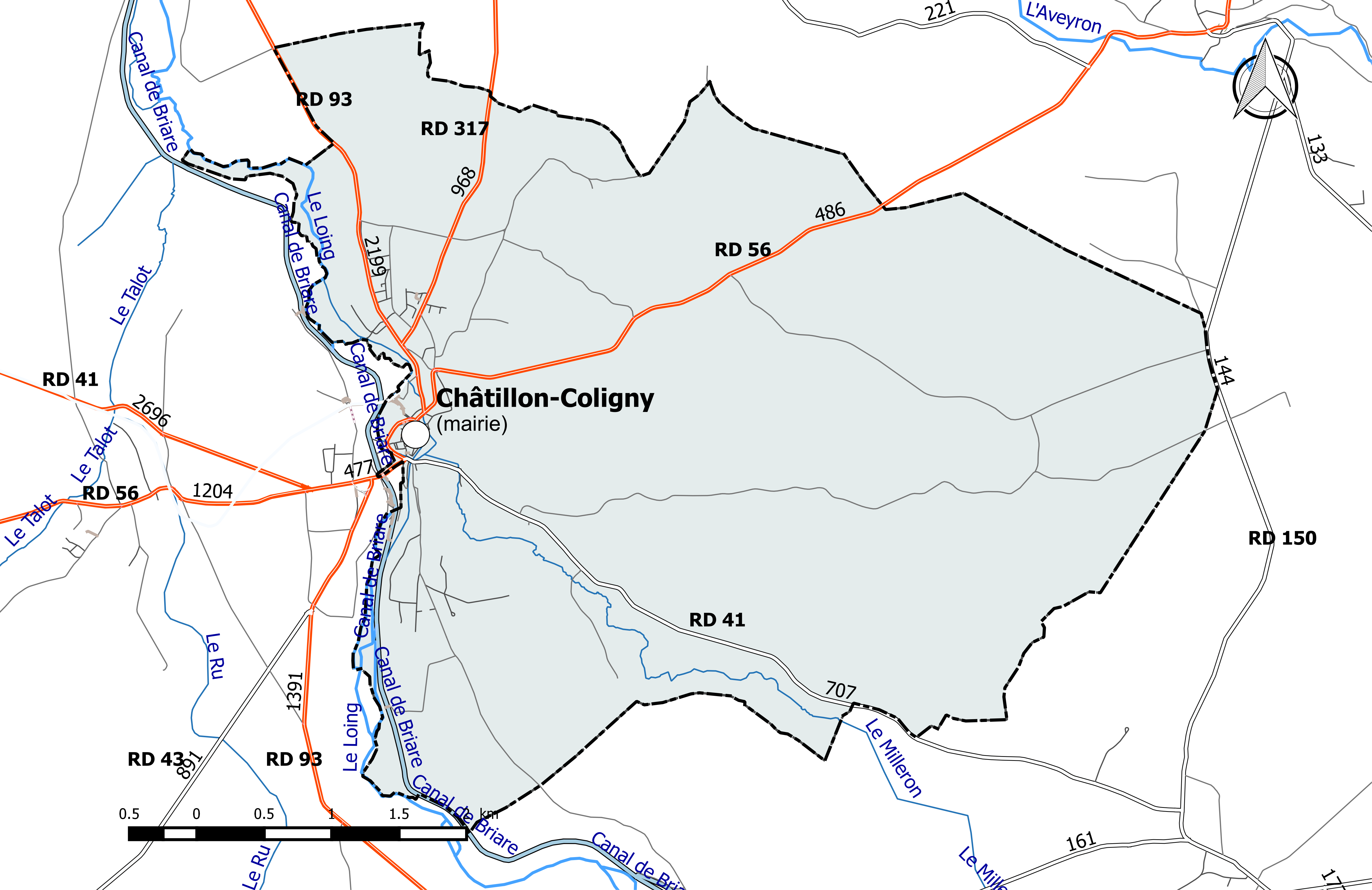 Carte du réseau routier de la commune de Châtillon-Coligny.